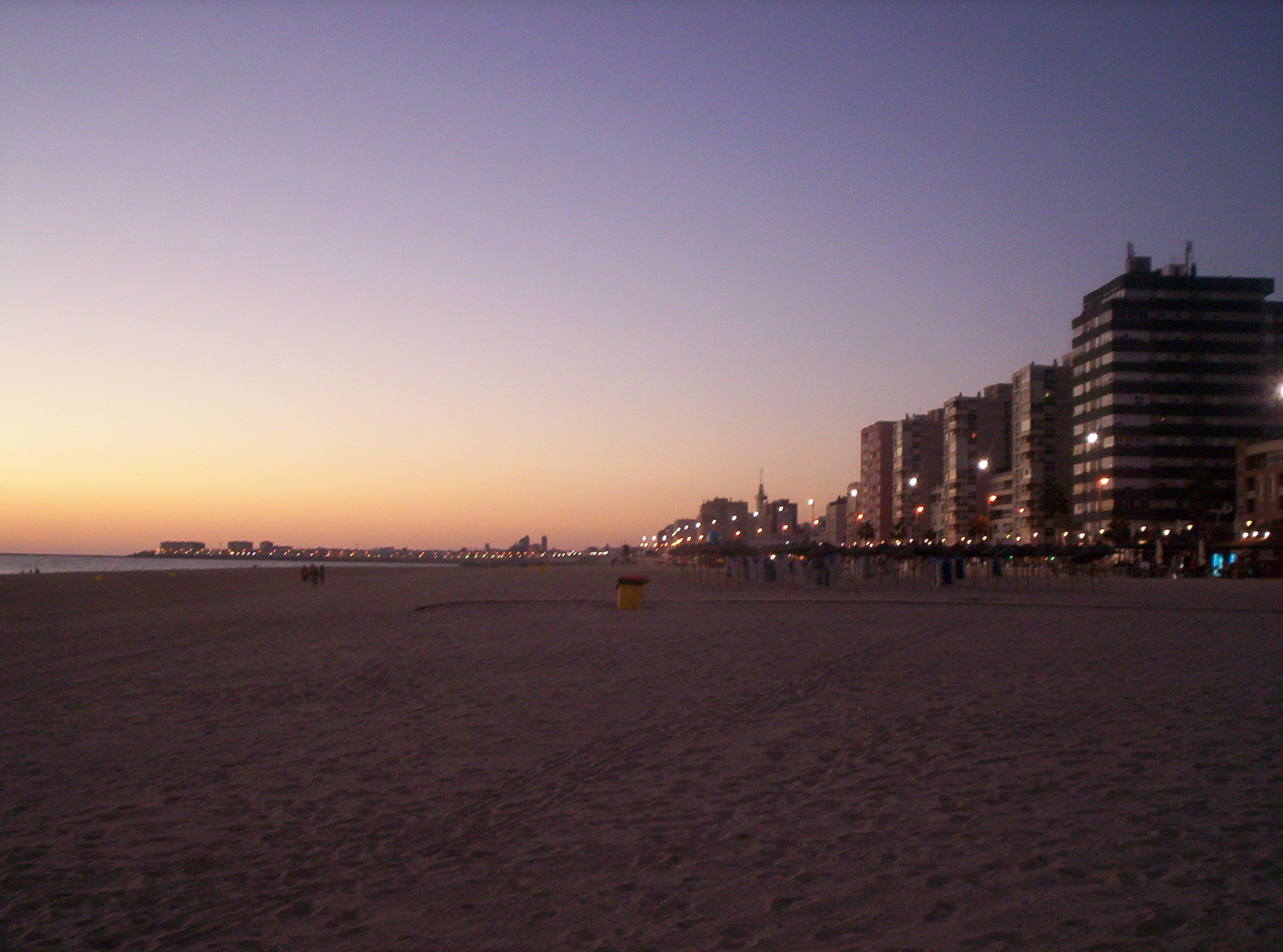 Vista de la zona norte de la ciudad de Cádiz desde la playa de la Victoria.